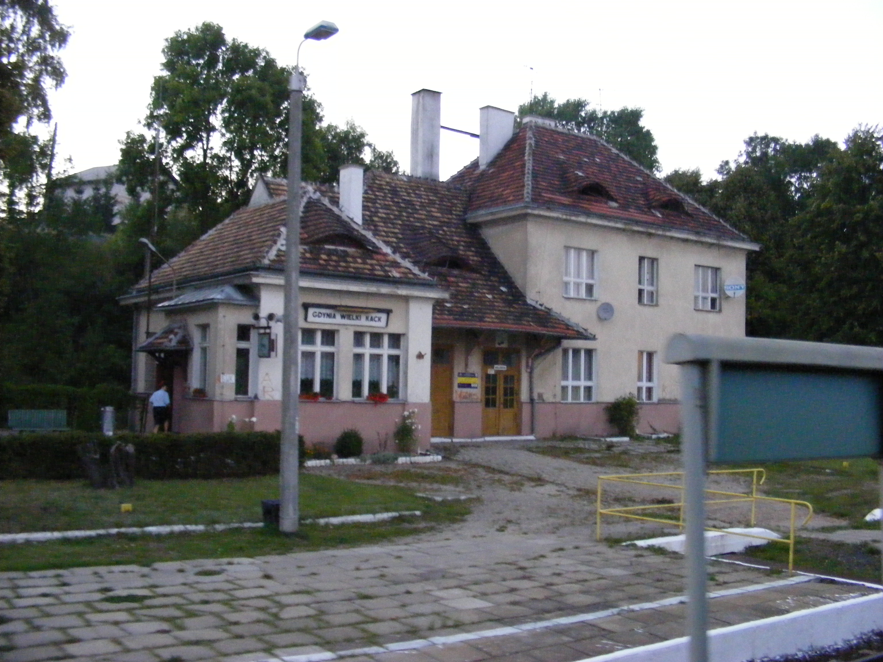 Stacja kolejowa Gdynia Wielki Kack (woj. pomorskie)